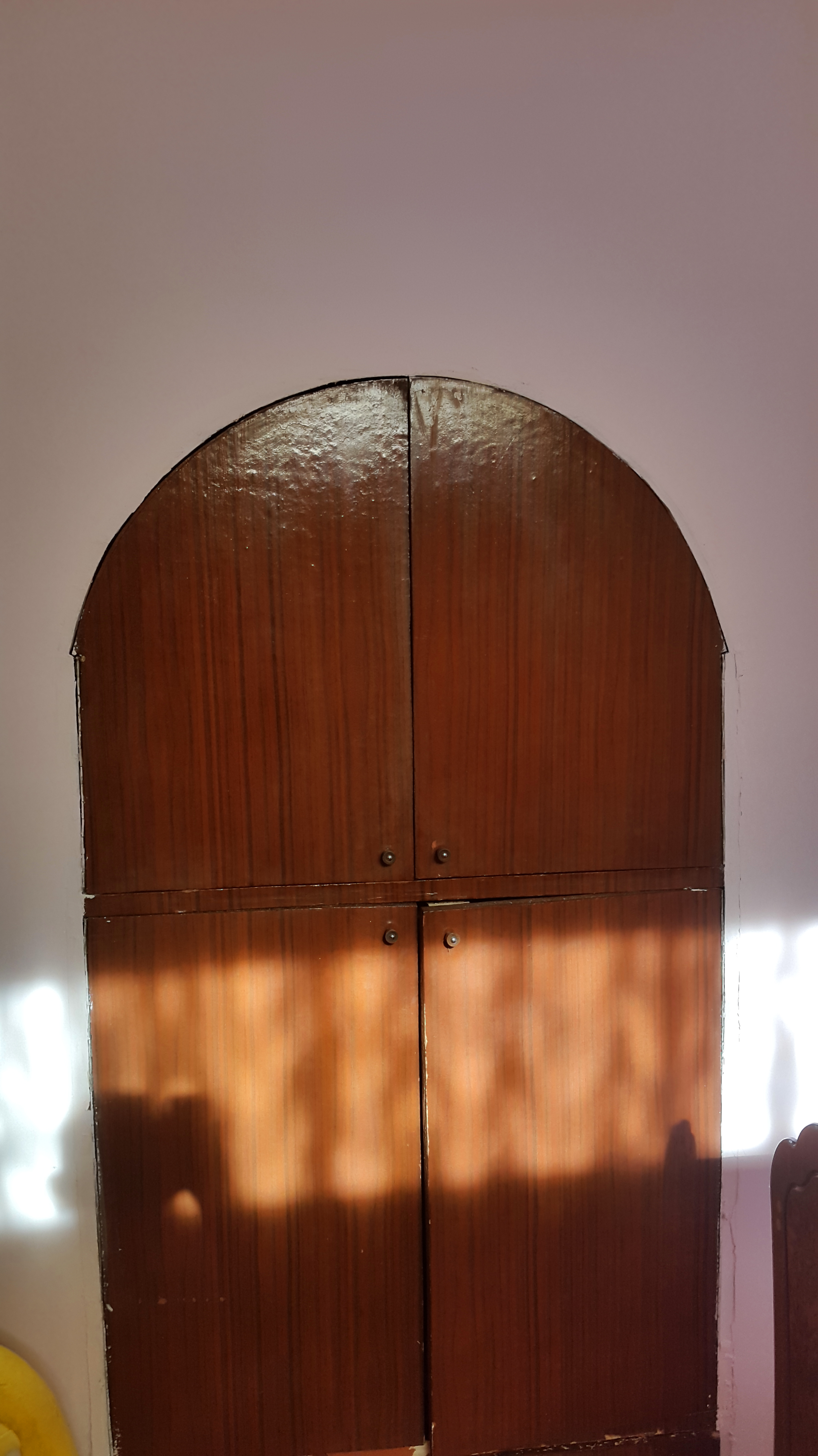 Կոզեռնի մատուռը